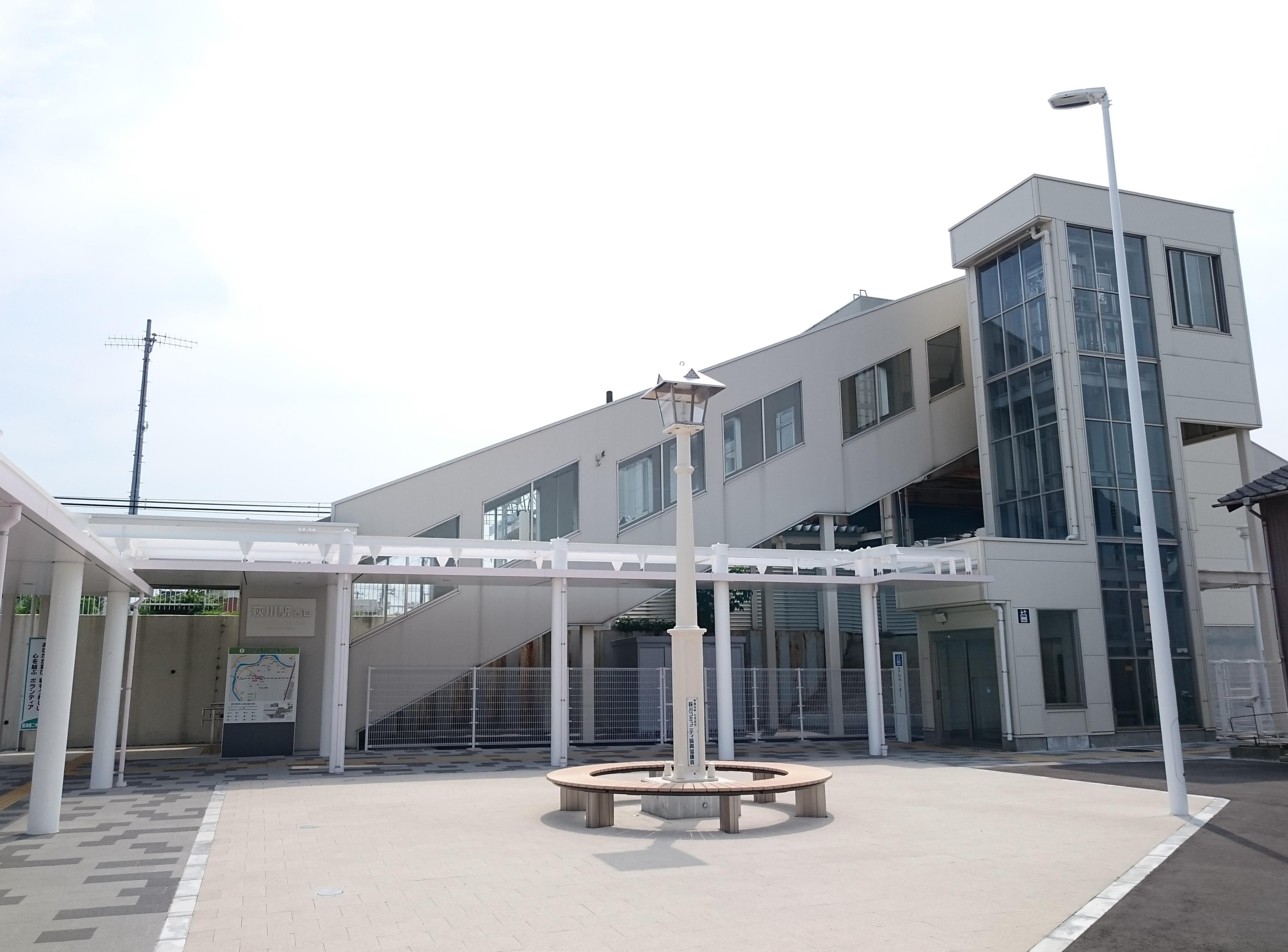 荻川駅の西口駅舎